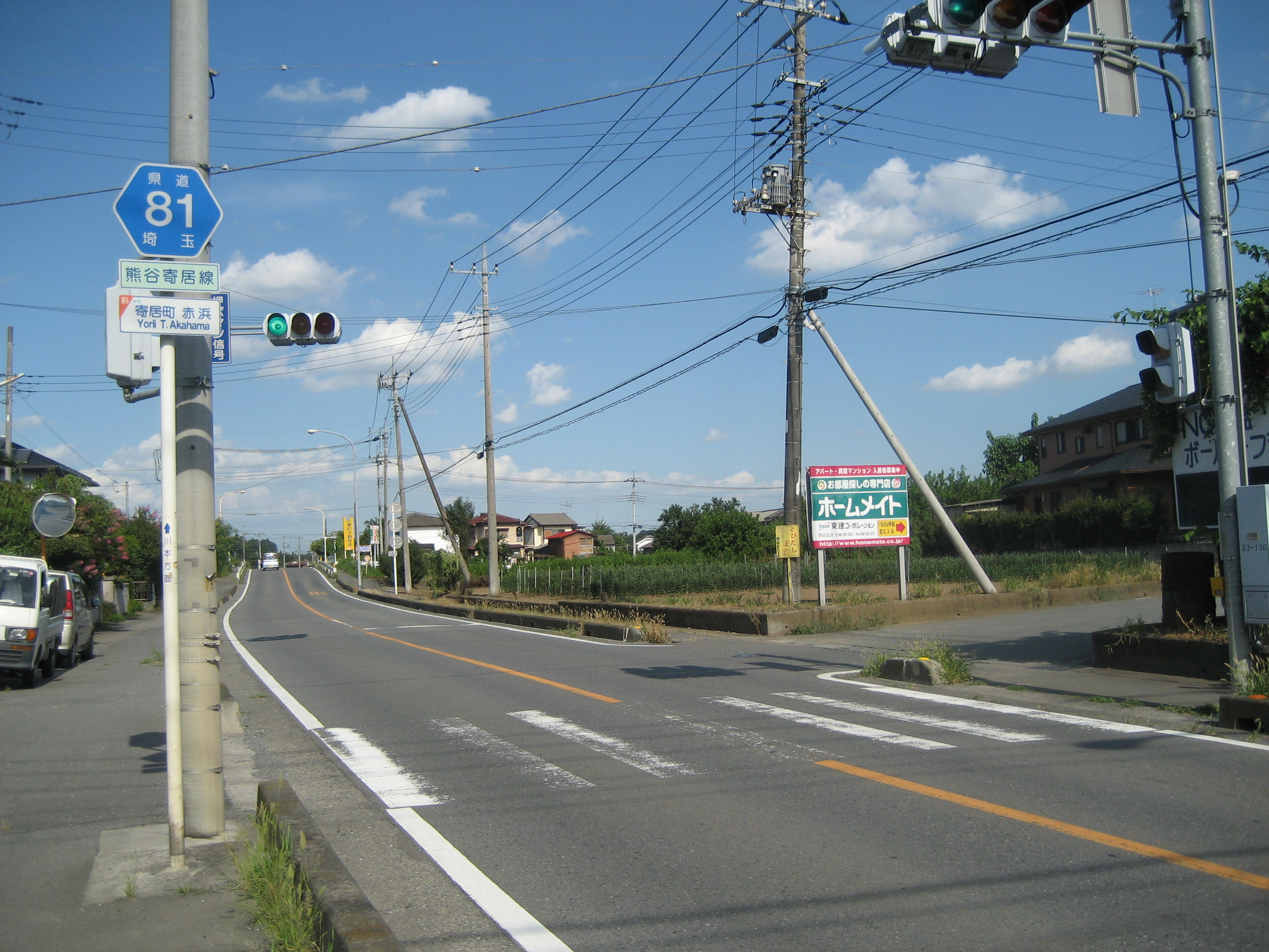 埼玉県道81号線寄居町赤浜付近